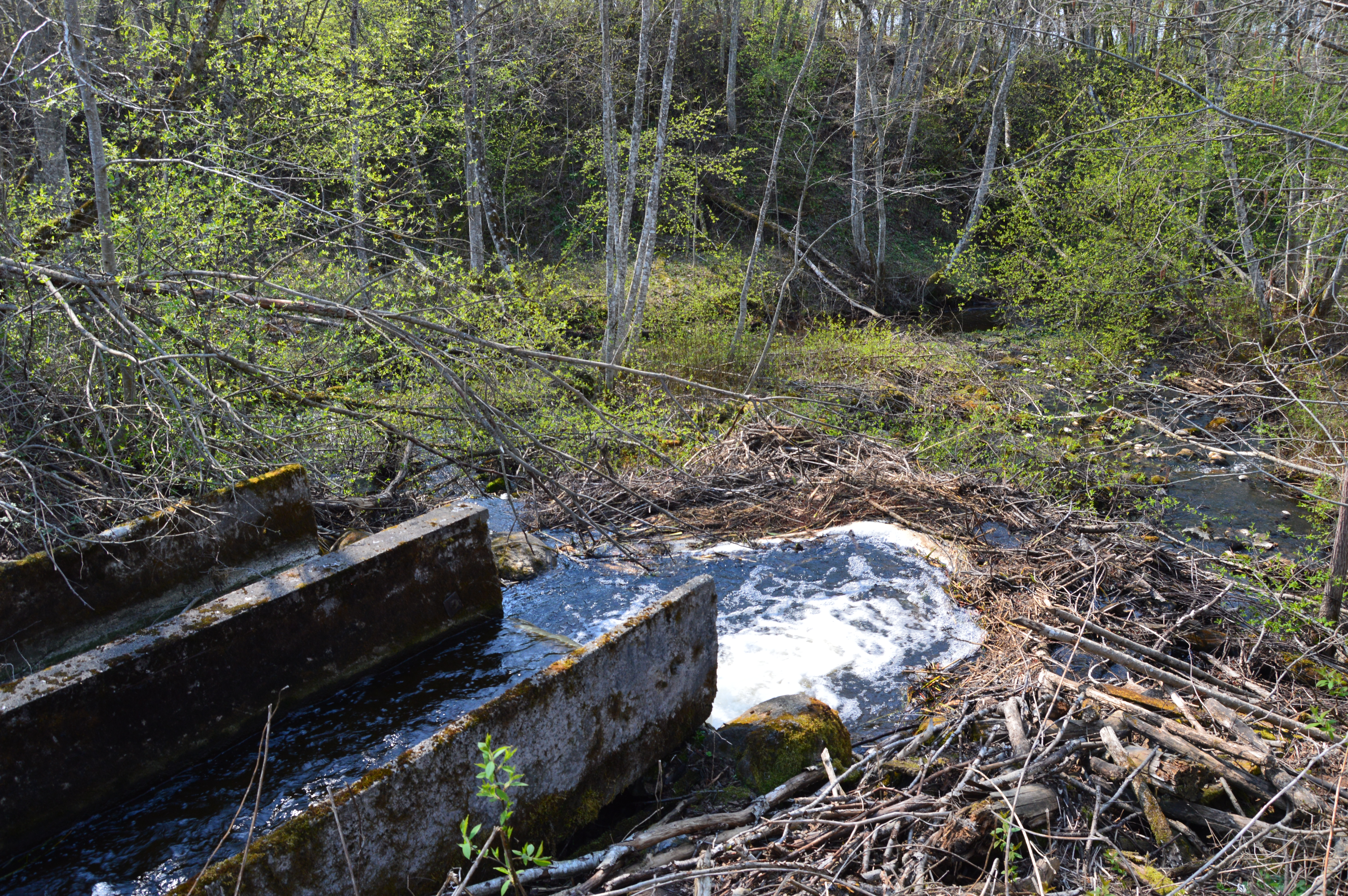 Kolga jõe väljavool Krabi Veskijärvest